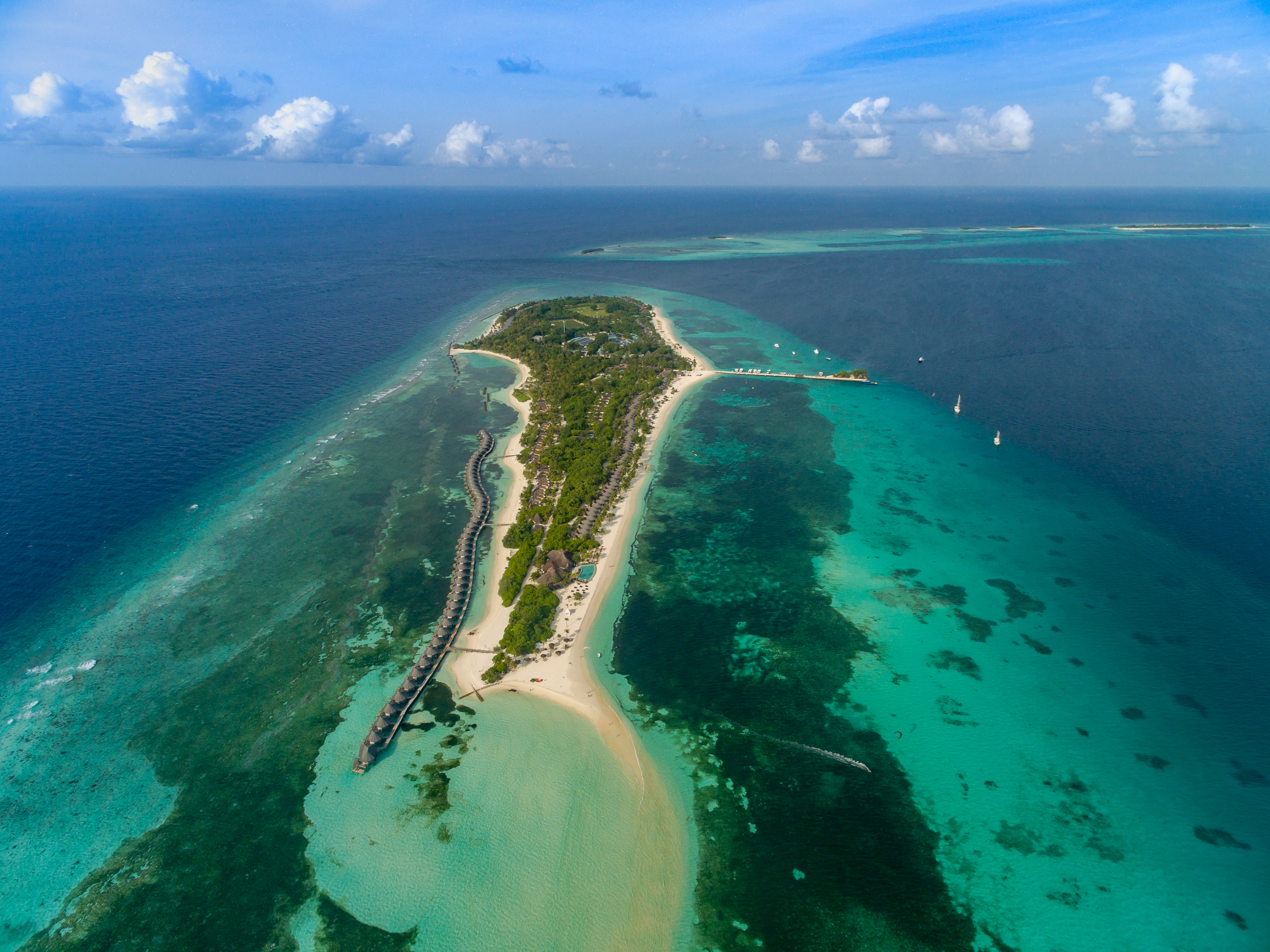 Malediven Luftbild